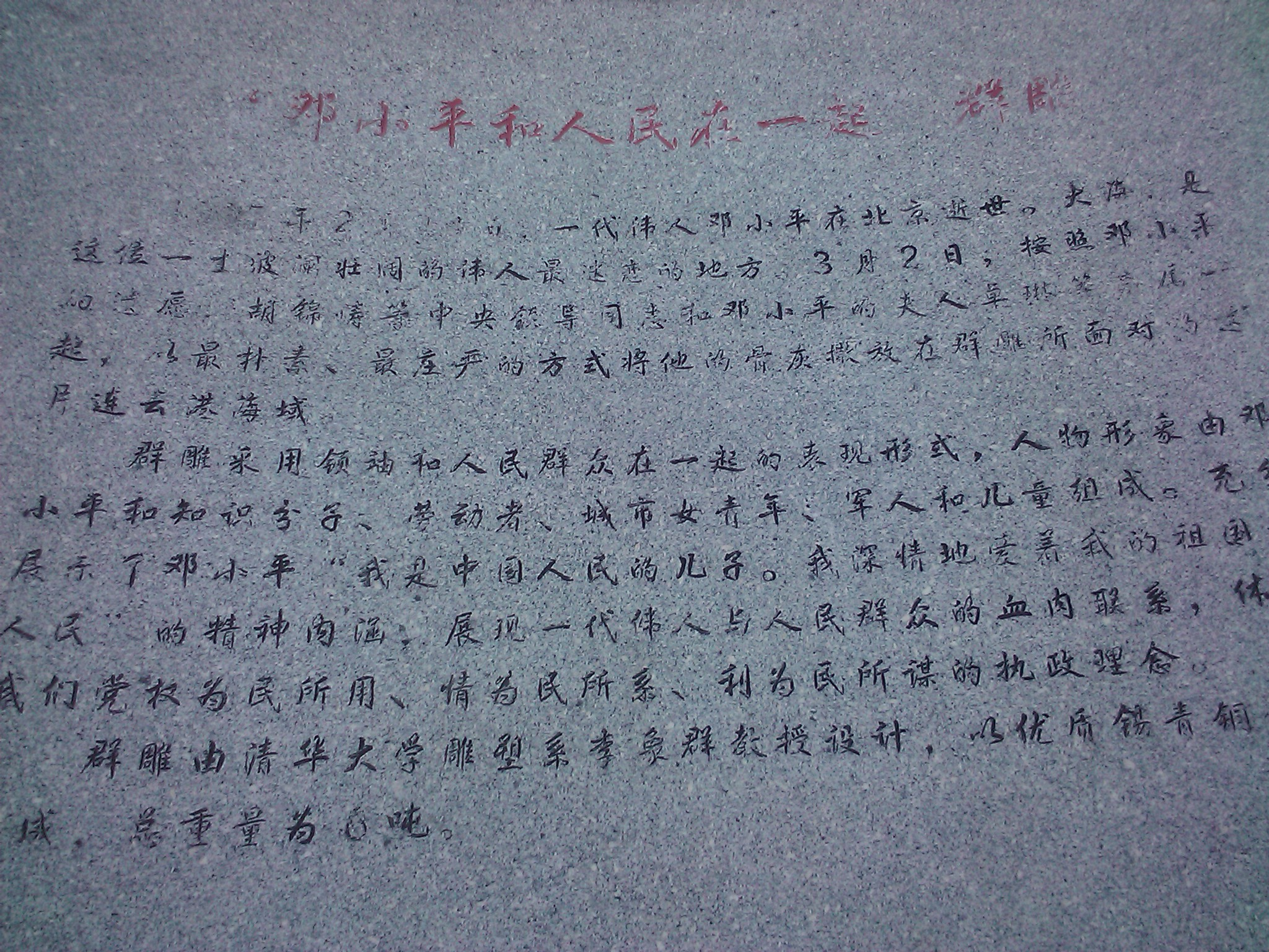 连岛邓小平石像的说明石牌